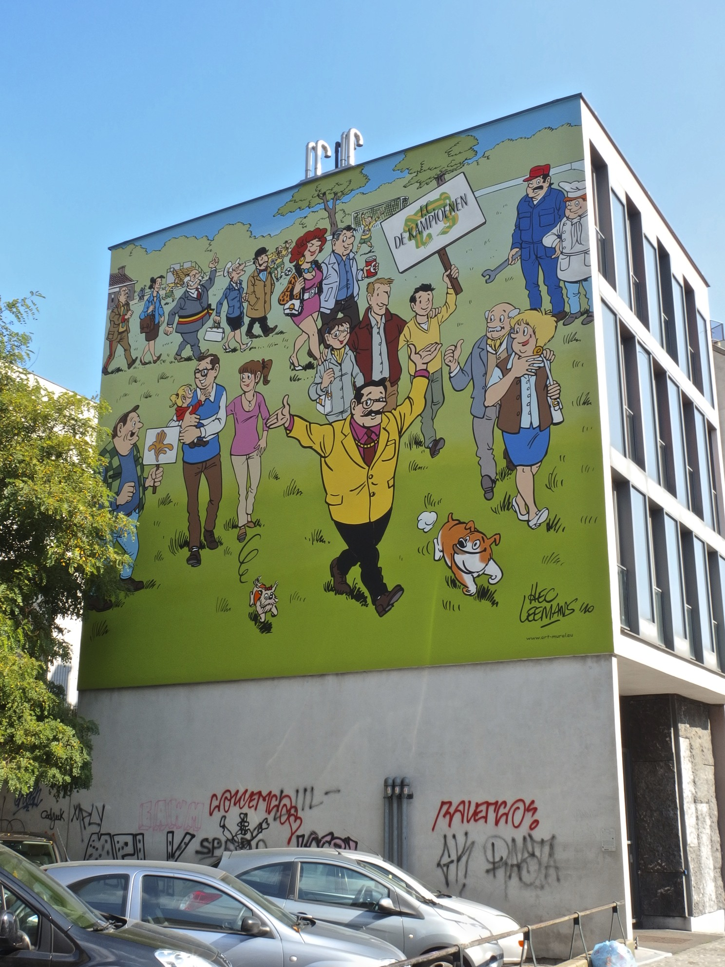 Stripmuur van het stripverhaal gebaseerd op de populaire tv-reeks. Locatie: Vaartstraat 27, Brussel